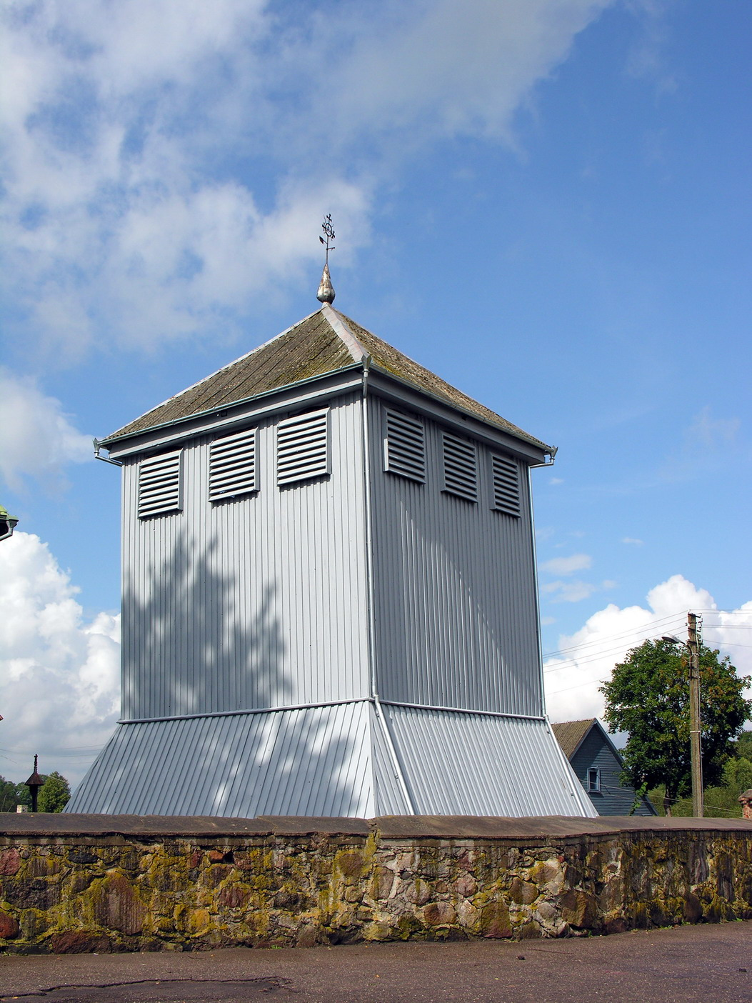 Seda, Mažeikių raj. Sedos Švč. Mergelės Marijos Ėmimo į dangų bažnyčia Varpinė Foto: Algirdas, 2006 m. rugsėjo 2 d., Lietuva